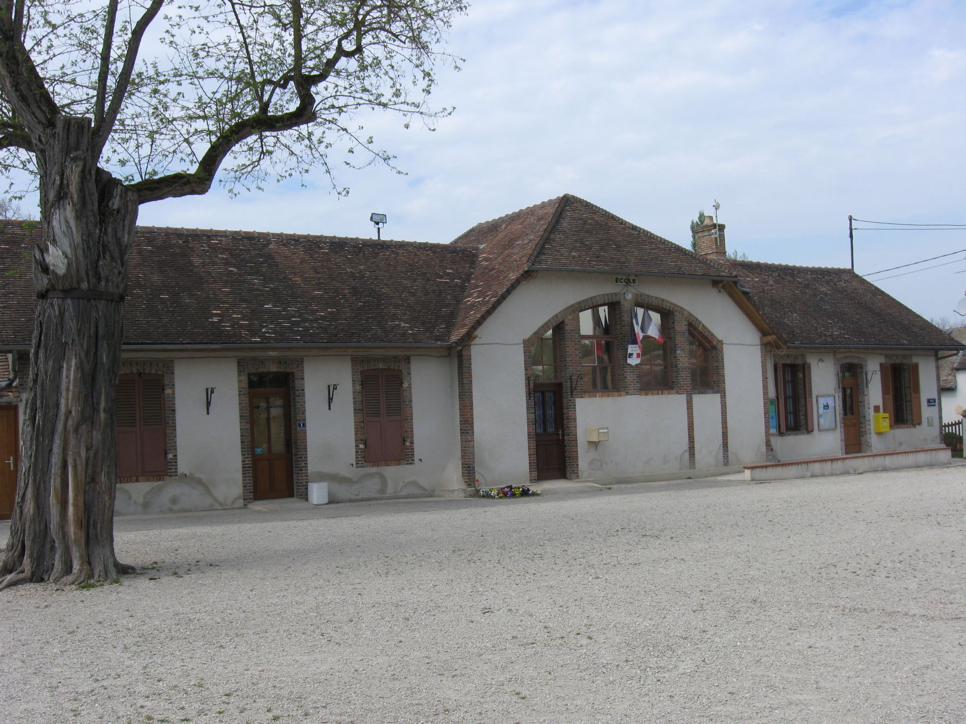 Mairie-école de Balloy. (Seine-et-Marne, région Île-de-France).